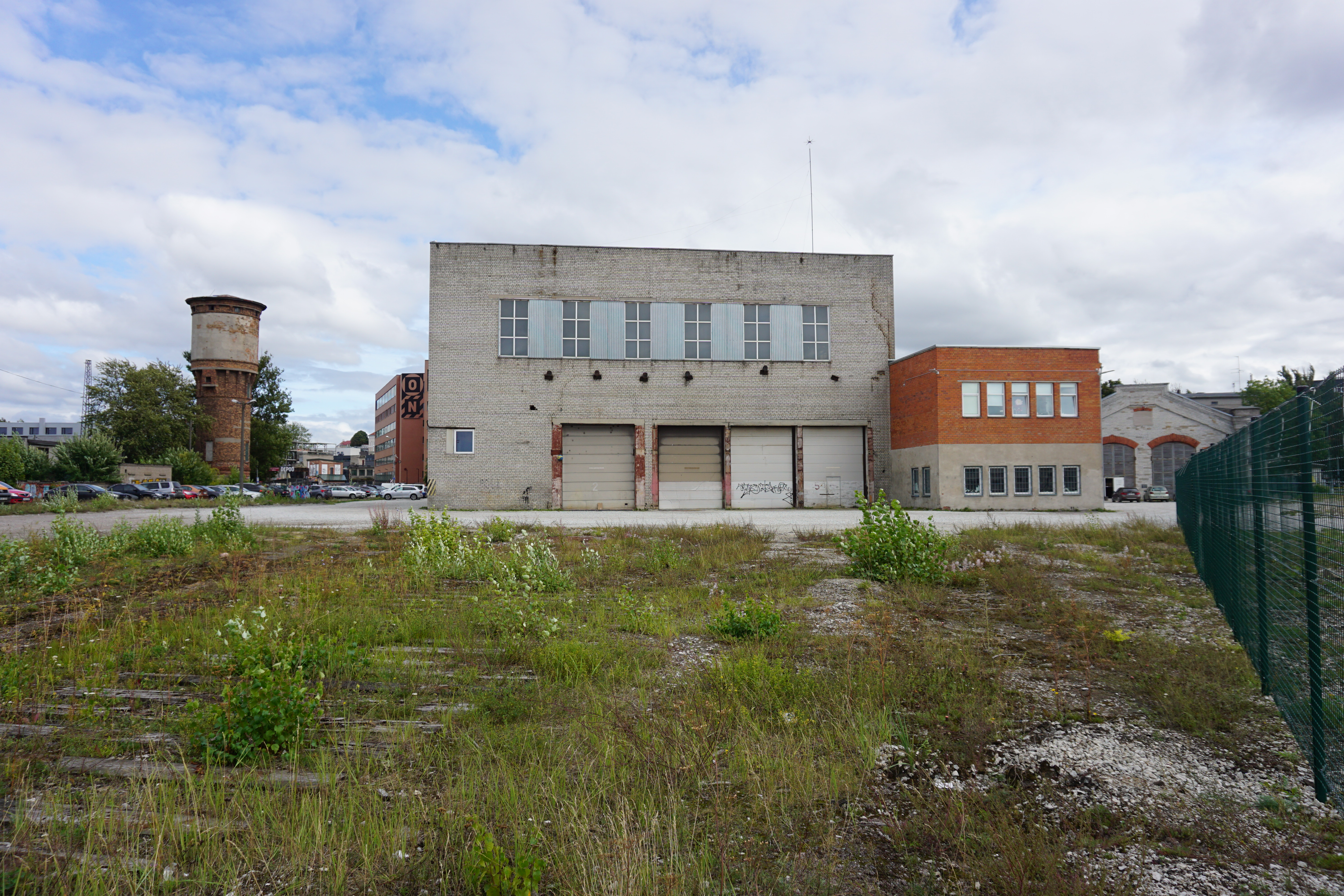 Endine Kopli veduridepoo